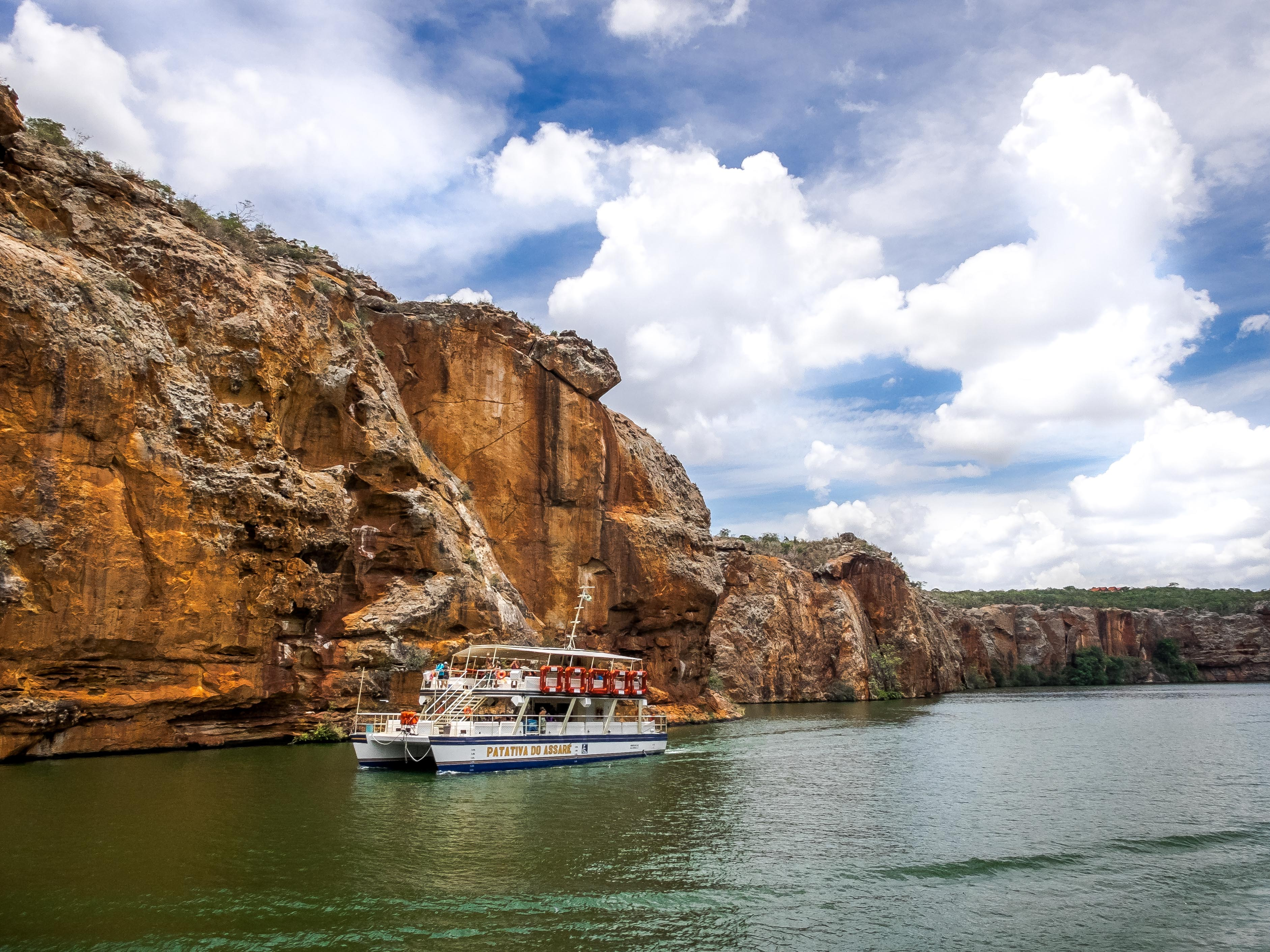 O Cânion do Xingó, considerado o quinto maior cânion do mundo e o maior navegável, surgiu após o represamento das águas do Rio São Francisco para a construção da Usina Hidrelétrica do Xingó (inaugurada em 1994), na divisa entre Alagoas e Sergipe. O rio em si foi descoberto por Américo Vespúcio em 4 de outubro de 1501, dia de São Francisco de Assis e assim foi chamado em homenagem ao santo. O Velho Chico é imenso, nascendo em Minas Gerais, passando pela Bahia, Pernambuco, Sergipe e Alagoas, antes de desembocar no Oceano Atlântico. E é na divisa entre estes dois últimos estados que se encontra o Cânion do Xingó. O rio Xingó é um dos inúmeros braços do Velho Chico, já na parte alagoana. Com a construção da barragem do Xingó, o Rio São Francisco triplicou seu tamanho, retendo seu volume e inundando as áreas ao redor. Um desses locais é hoje o chamado Cânion do Xingó.